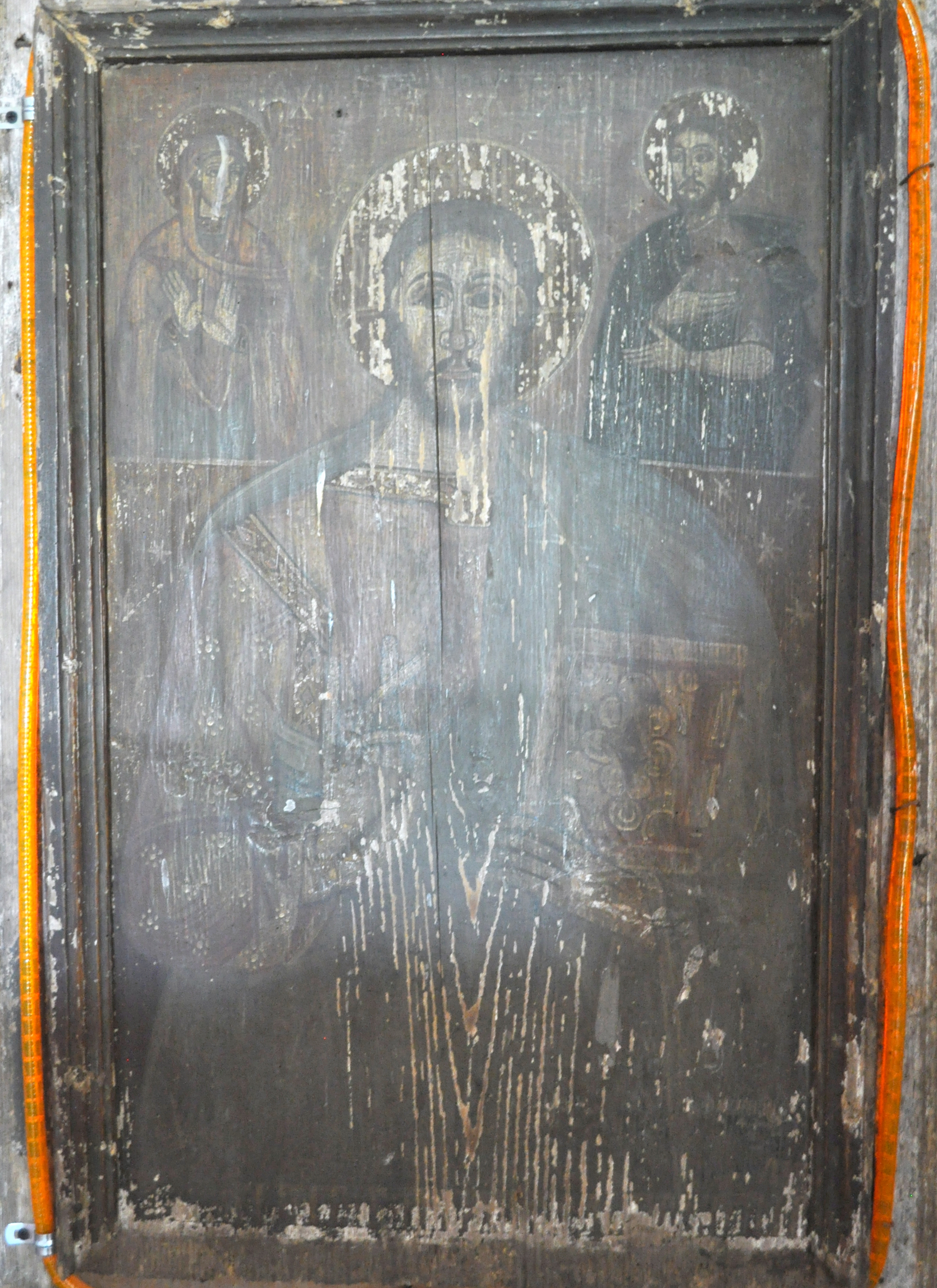 Biserica "Înălţarea Domnului" , sat NUCŞOARA; comuna SĂLAŞU DE SUS